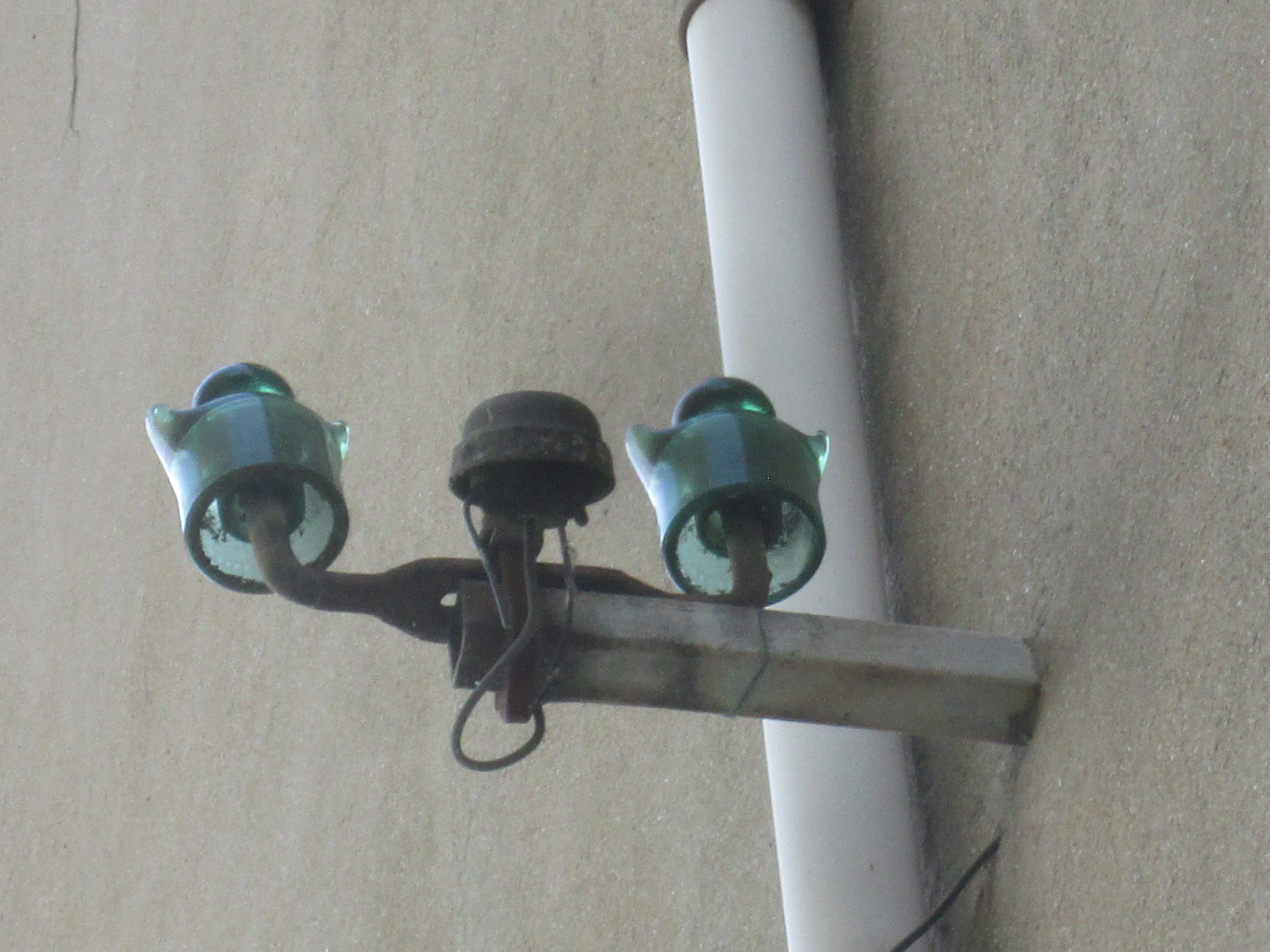 Photographie d'une ancienne arrivée PTT chez un abonné, avec isolateurs et boitier de câble.